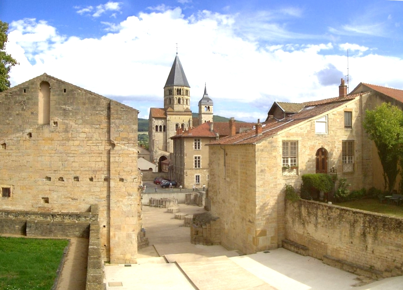 Abbaye de Cluny